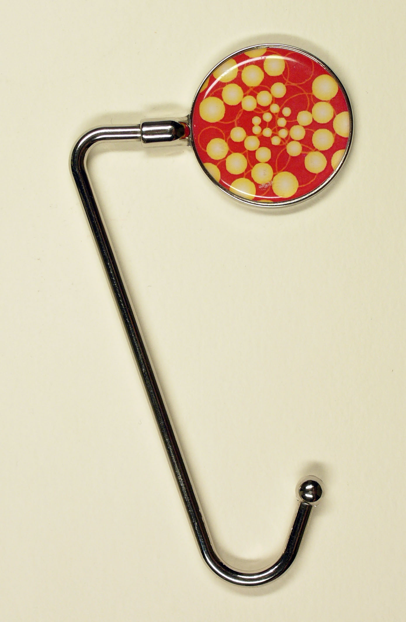 Handbag holder